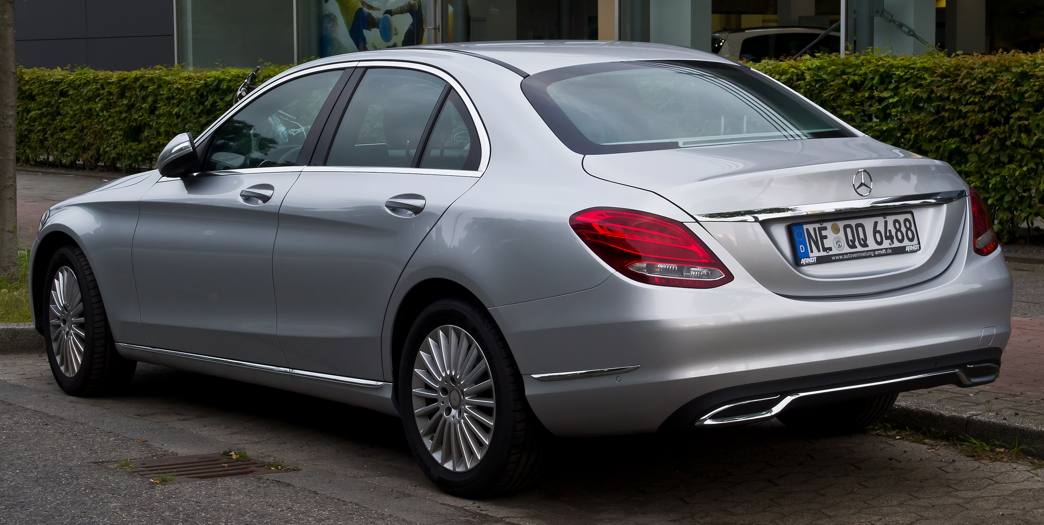 Mercedes-Benz C 220 BlueTEC Exclusive (W 205)